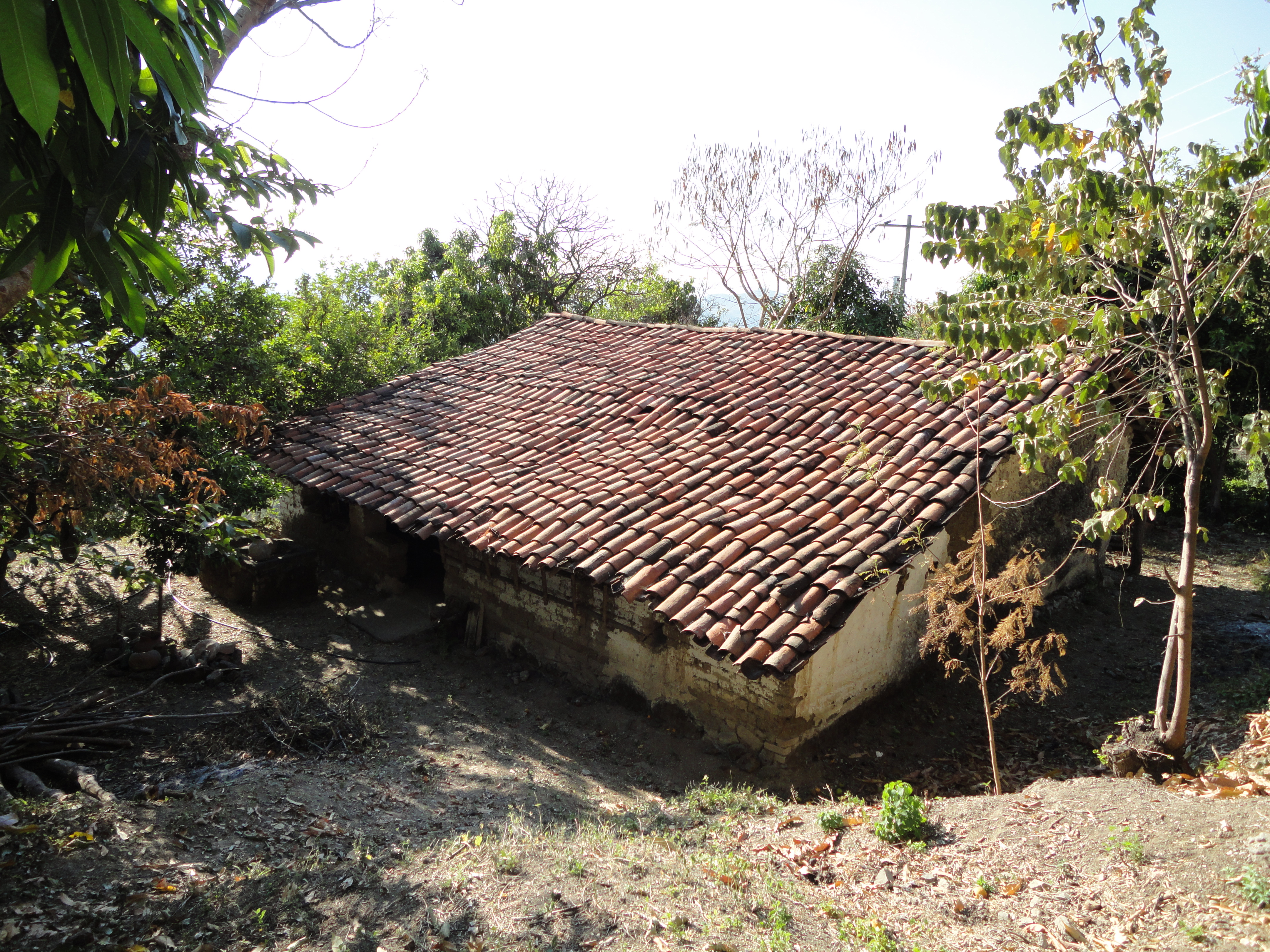 Este es el tipo de vivienda en esta pequeña pero maravillosa poblacion, son asi debido al clima caluroso de este lugar. Ademas las casas son hechas con materias primas aqui mismo encontradas.